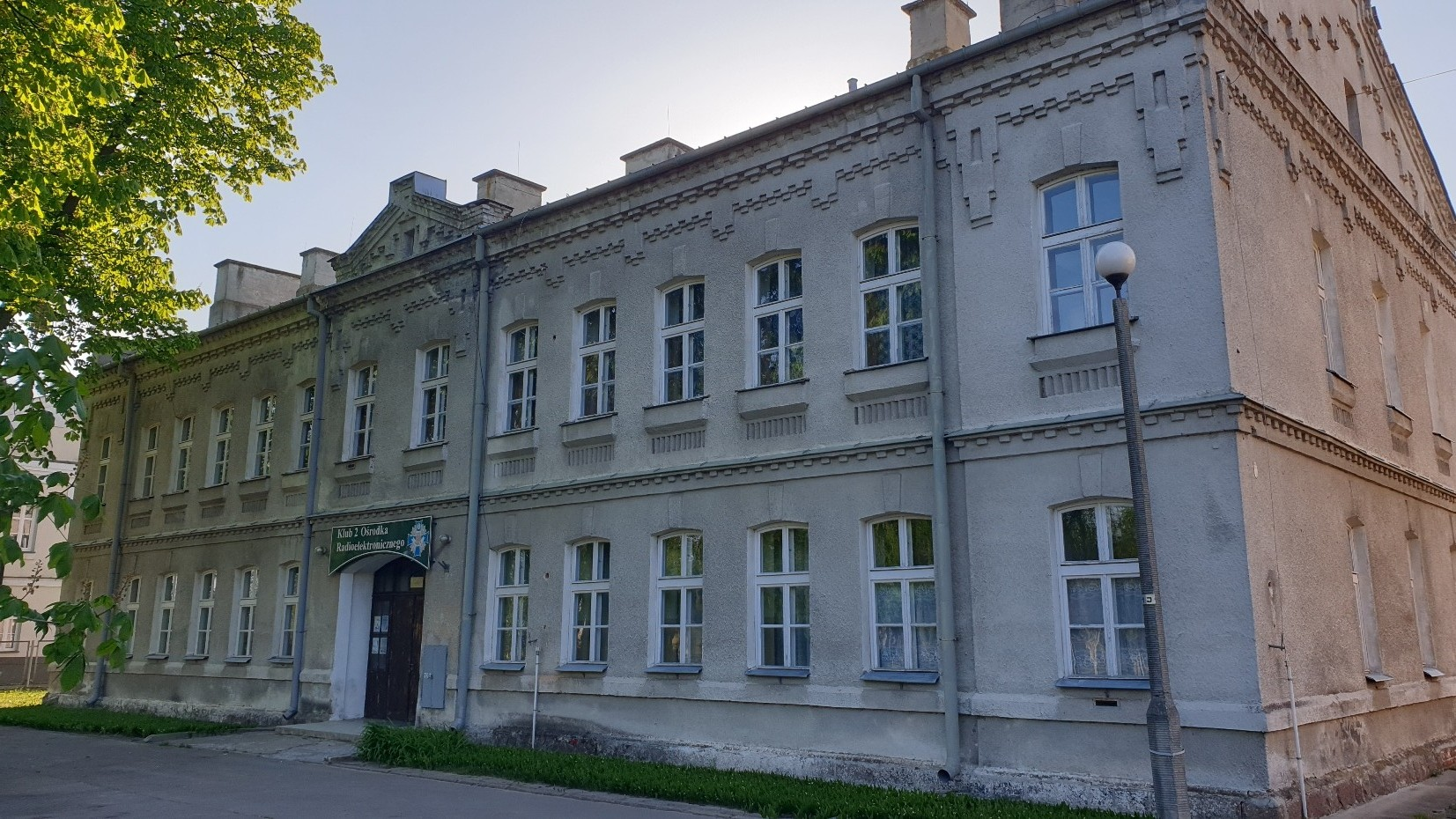 Klub wojskowy Przasnysz